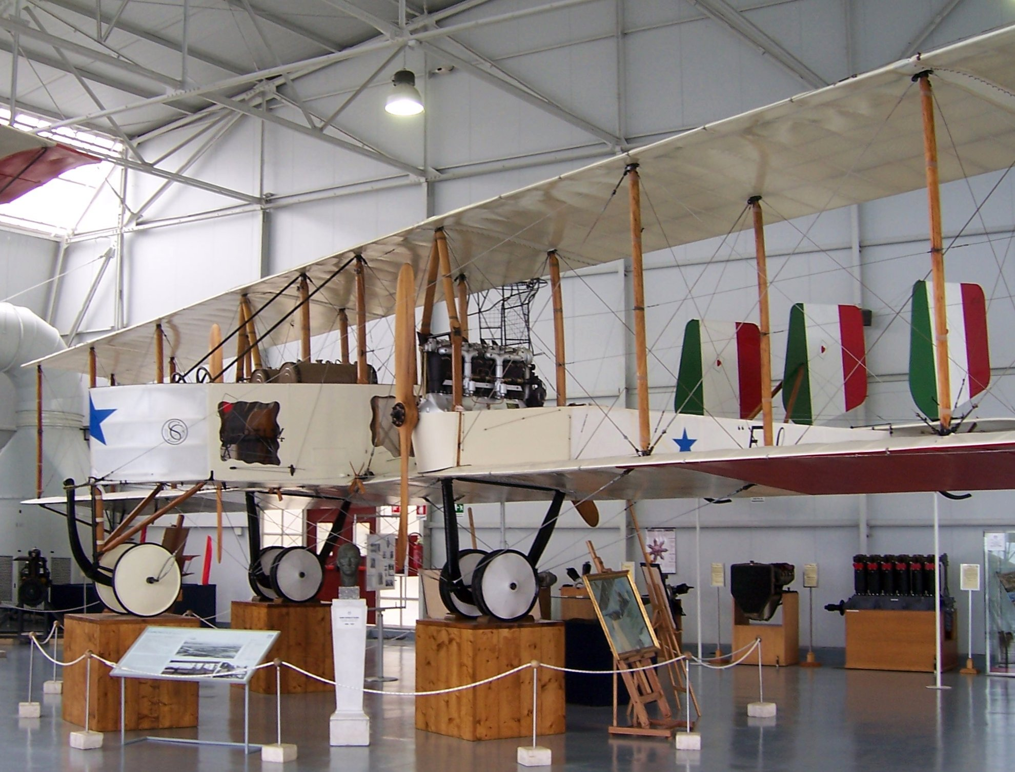 Caproni Ca.3 im Museo storico dell'Aeronautica Militare di Vigna di Valle